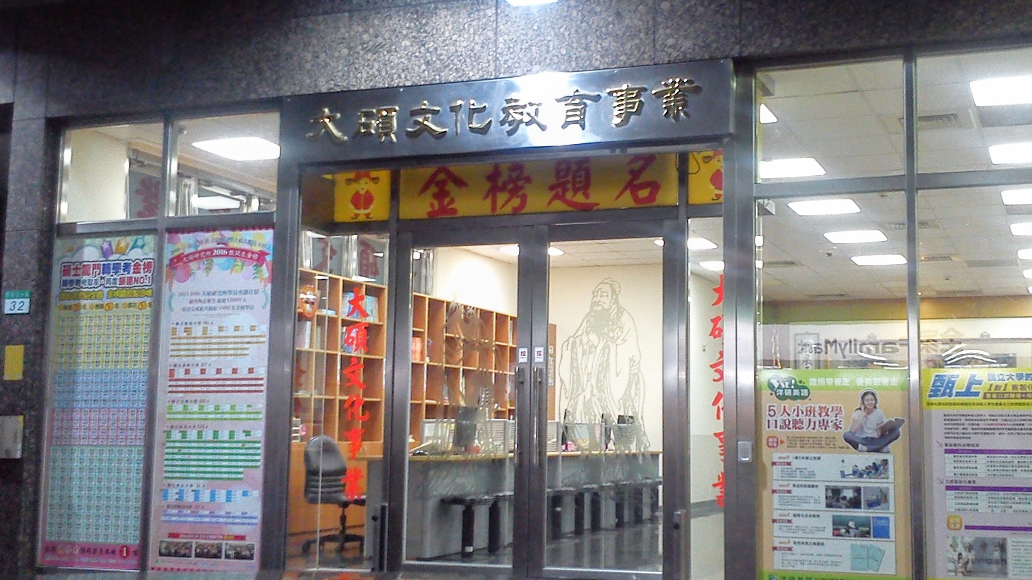 台北大碩